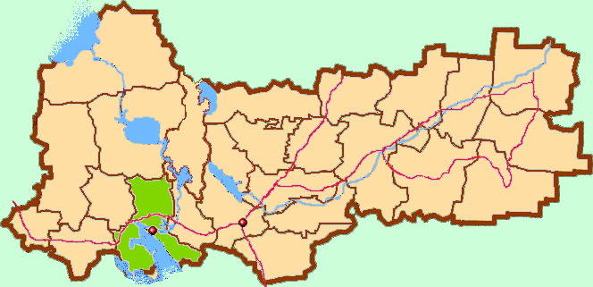 Vologda Oblast map by Al Silonov